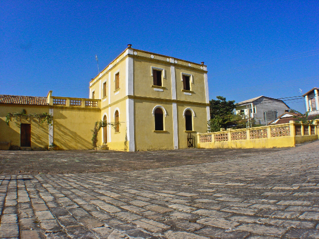 Museu do Quiririm